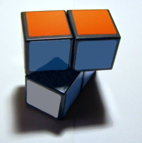 中文（台灣）: 轉動中的2x2x1魔術方塊